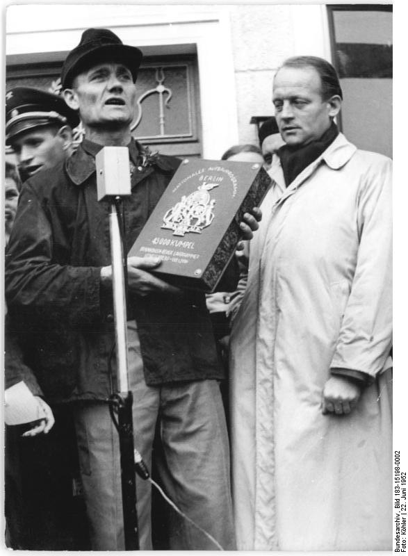 Bergarbeiter, Ehrung Zentralbild Köhler 22.6.52 Am 22.6.52 kamen 5000 der besten Bergarbeiter nach Berlin, um an der Enttrümmerung der deutschen Hauptstadt mitzuhelfen.Sie wollen damit beweisen, dann sich ein solch schmachvoller Tag in der Geschichte des deutschen Volkes, wie der Überfall der Faschisten auf die Sowjetunion am 22.6.41, nicht wiederholt.UBz: Der Bergarbeiter, Aktivist Wilhelm Herold vom Revier Sanftenberg, überbringt Grüsse und Verpflichtungen der Kumpel aus dem Braunkohlenrevier Lauchhammer, Senfenberg-Welzen.(Rechts)Stadtrat Hans Gericke, Mitglied des Nationalkomitees für den Wiederaufbau Berlins.